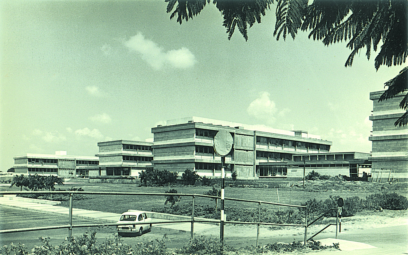 אוניברסיטת תל אביב הפקולטה למדעים מדויקים תוכנן ע"משה הראל